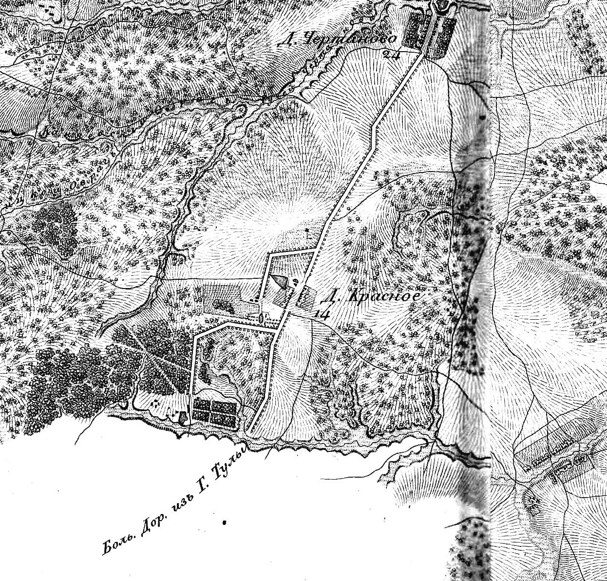 Топографическая карта окружности Москвы, 1818 год, фрагмент: Красное (сейчас Чертаново).